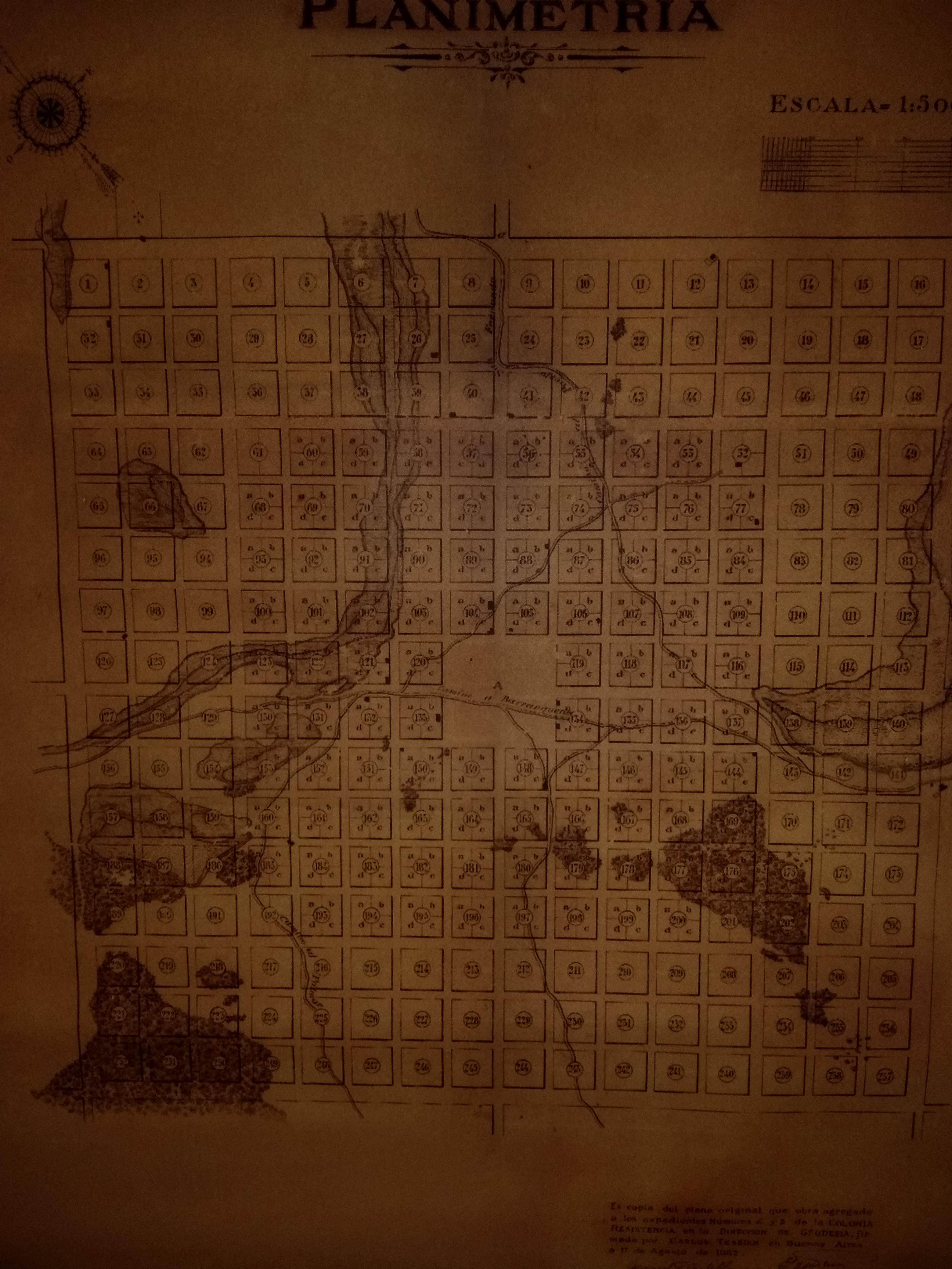 Plano encargado al agrimensor Carlos Tassier del pueblo de Resistencia fundado en 1878, el plano fue hecho en 1882. Se aprecian los números de manzana y parcelas originales, lagunas, zonas bajas, áreas de monte nativo y caminos. De los bajos y lagunas solo sobrevive con una extensión mucho más acotada la laguna Argüello ubicada en el mapa en el extremo derecho ocupando parte de las manzanas 138 a 142. Reproducción ampliada exhibida en el Museo del Hombre Chaqueño.